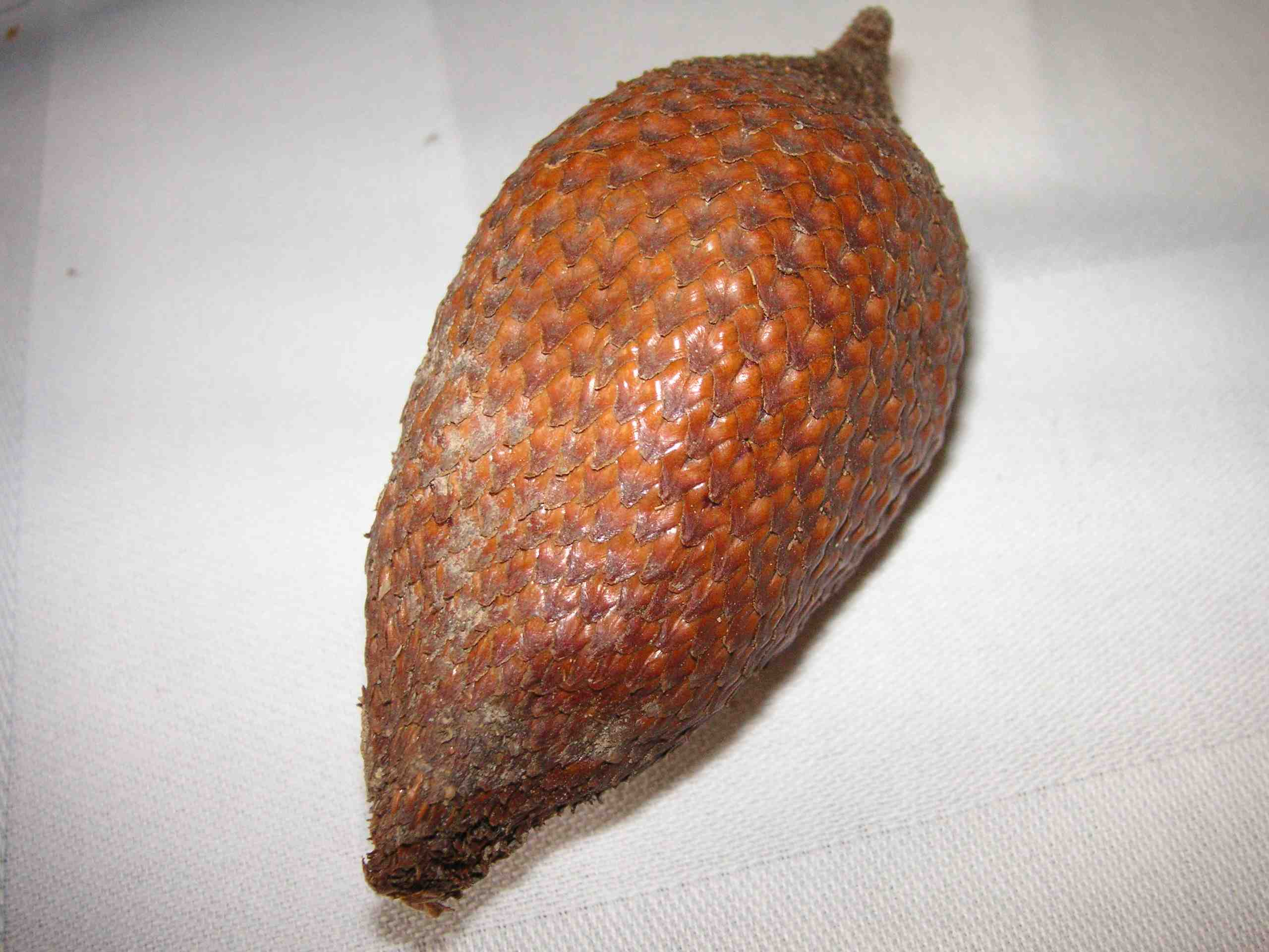 Frucht der Salakpalme Salacca zalacca